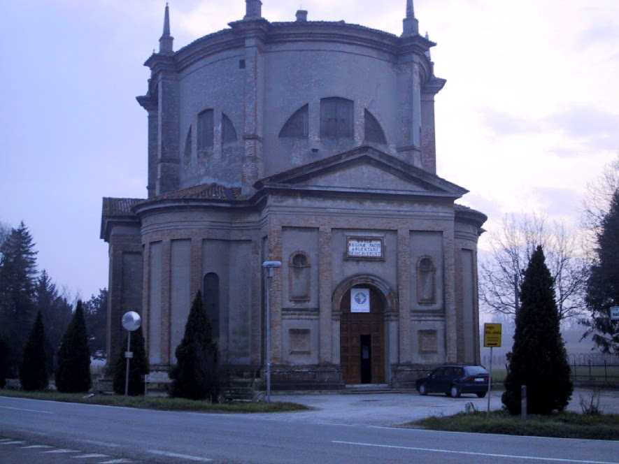 È una foto che ho scattato alla Celletta. Questa chiesa, come ogni edificio di Argenta, è stata quasi completamente distrutta nella seconda guerra mondiale. Il campanile che si sarebbe dovuto trovare alla sinistra, vicino alla strada, non è stato ricostruito sebbene il progetto lo prevedesse. L'immagine è stata scattata con una fotocamera Kodak.